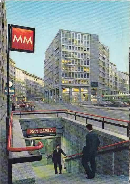 Milano, l'uscita della metropolitana di piazza San Babila